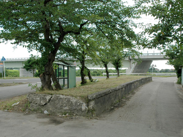 秋田中央交通線川崎停車場跡